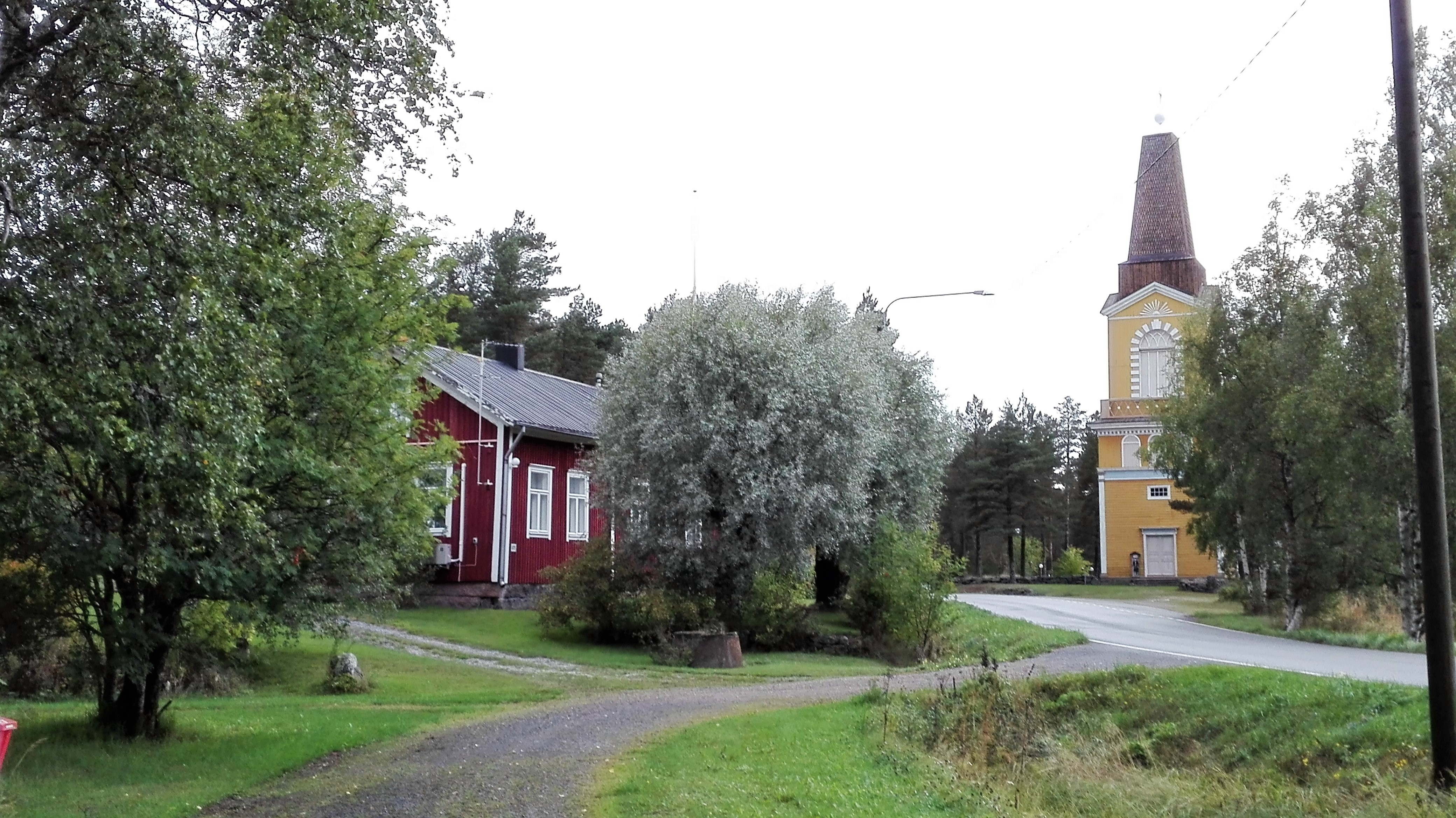 I kyrkbyn i Sideby finns det gamla kommuncentret, med kyrka och klockstapel, prästgård (såld av församlingen), före detta kommunhus från den tid Sideby socken var en egen kommun.